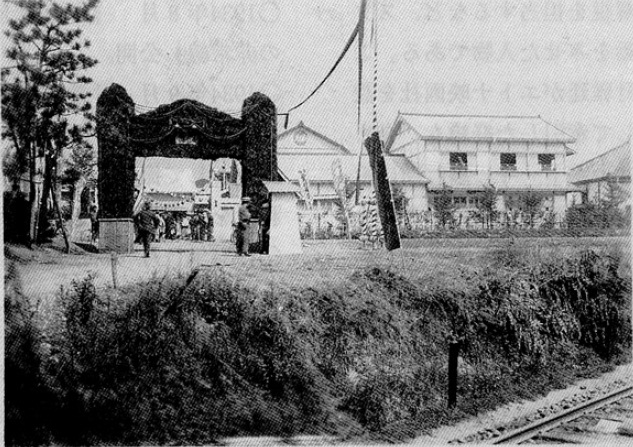 マキノ・プロダクション御室撮影所、1928年の写真